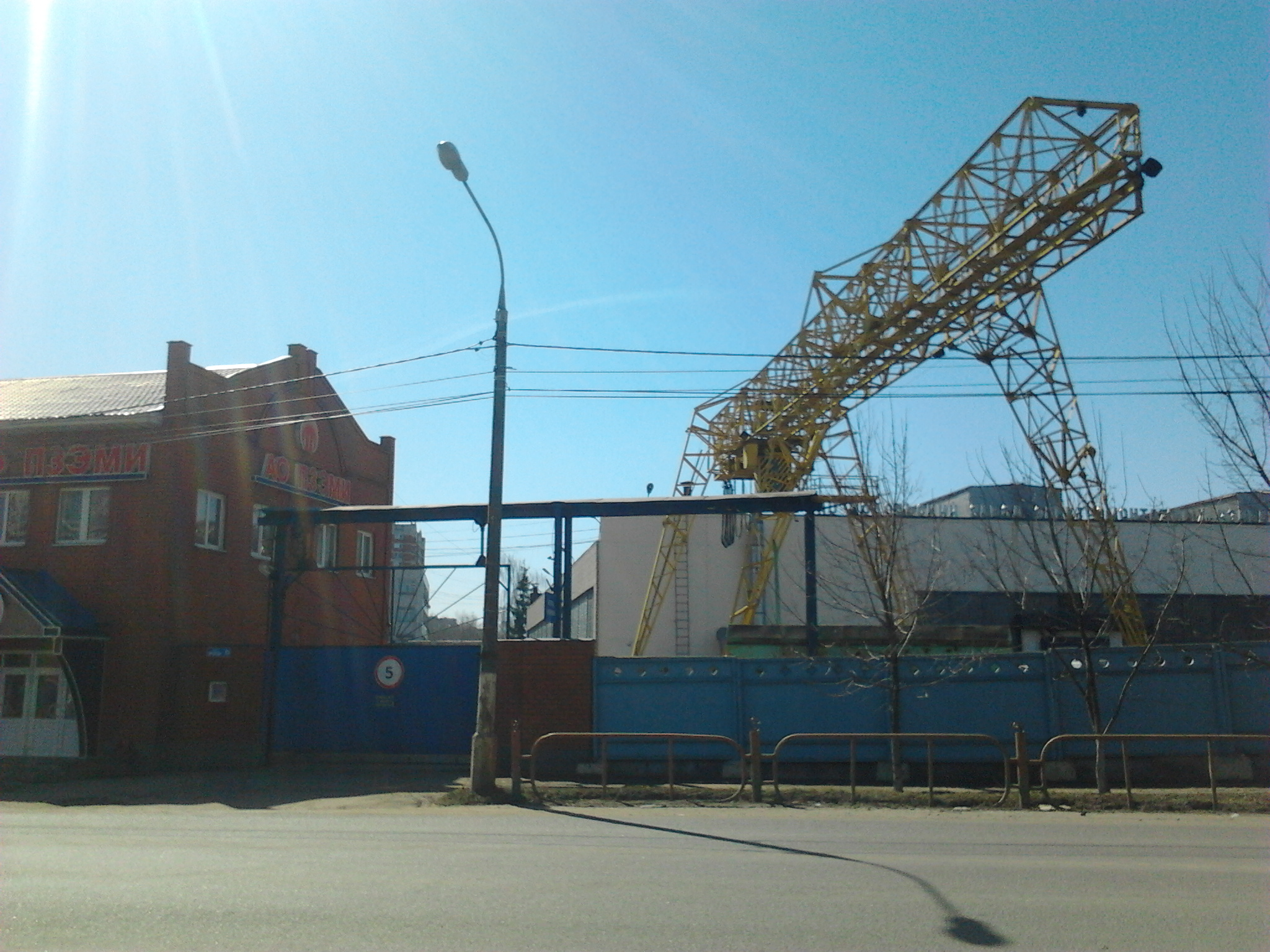 Подольский завод электромонтажных изделий